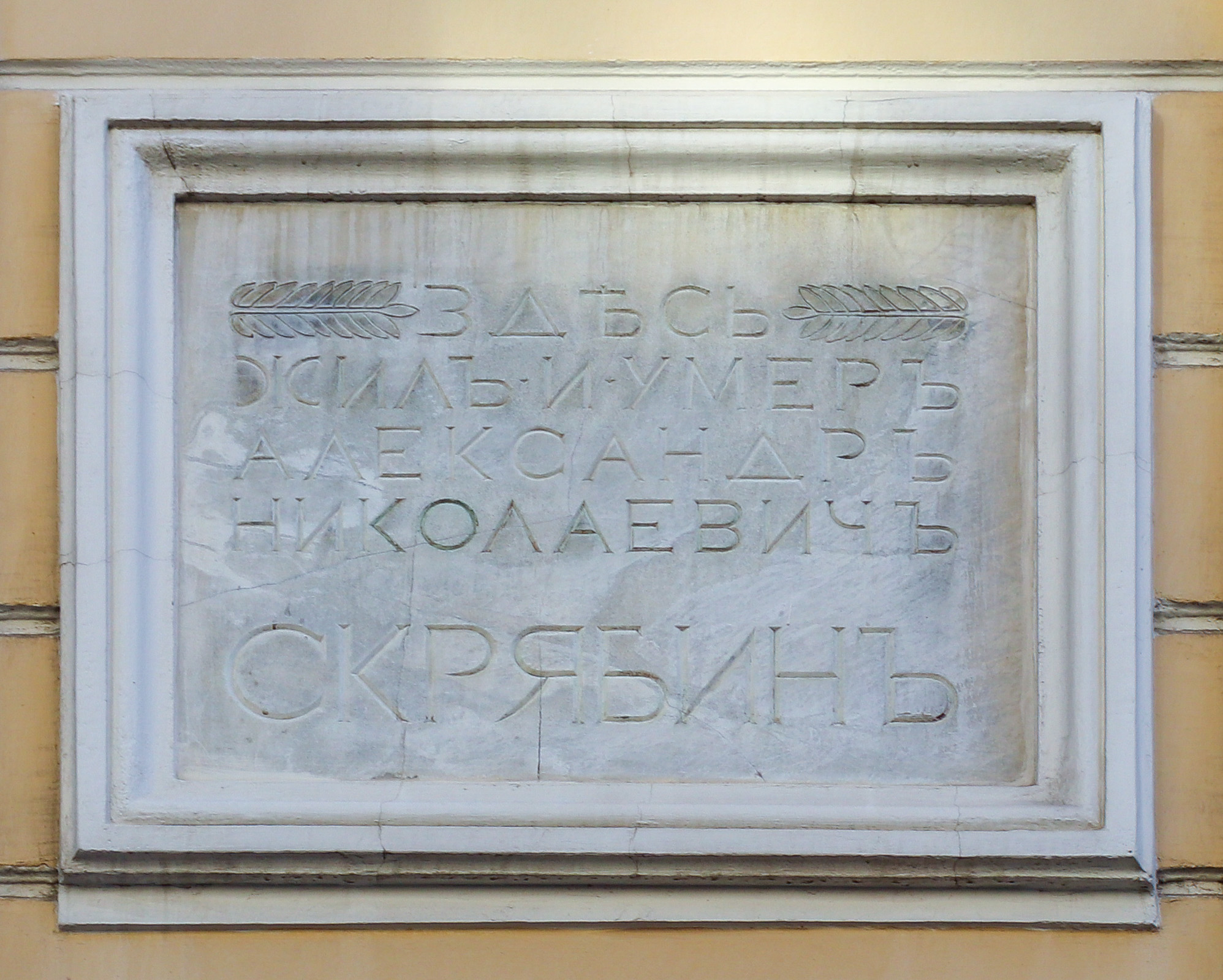 Мемориальная доска русскому музыканту Александру Скрябину (1872—1942). Доска из мрамора была установлена в 1916 году на фасаде дома, в котором в 1912—1915 жил Александр Скрябин (Б. Николопесковский переулок, 11, стр. 1). Ныне в здании расположен Мемориальный музей А. Н. Скрябина.